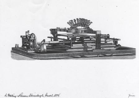 Grafisk trykk som forestiller en skrivekugle, modell fra 1874. Scannet fra Malling-Hansens etterkommeres samling